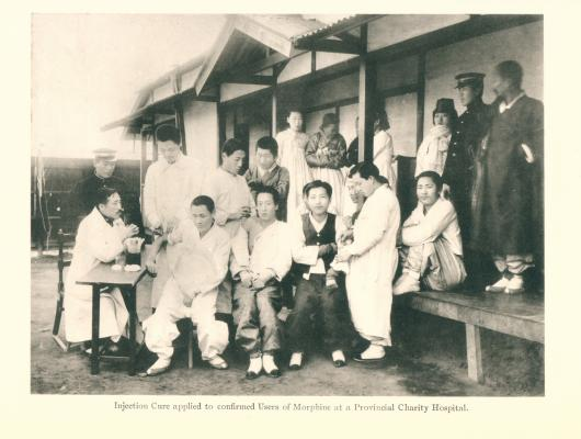 자혜의원(慈惠醫院)에서 모르핀(morphine) 중독자에게 주사치료를 하는 장면이다.